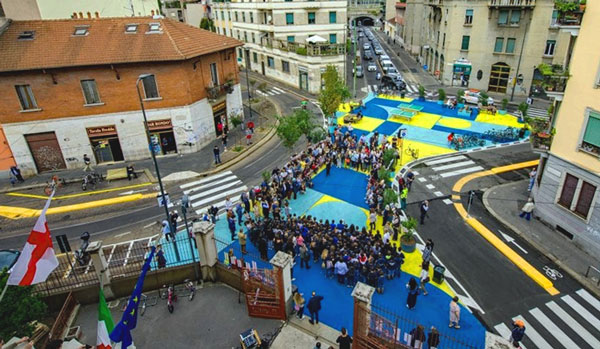 Piazza Arcobalena a NoLo, Milano, il giorno dell'inaugurazione